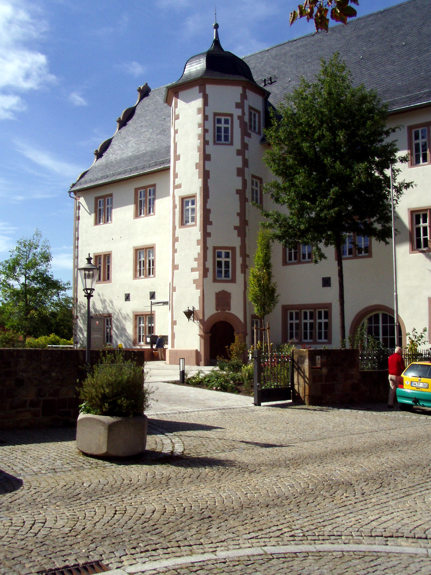 Alte Vogtei in Gerolzhofen, dreigeschossiger Satteldachbau mit Schweifgiebeln und polygonalem Treppenturm, um 1600; Inschriftentafel mit Echter Wappen bez. 1614. This is a photograph of an architectural monument.